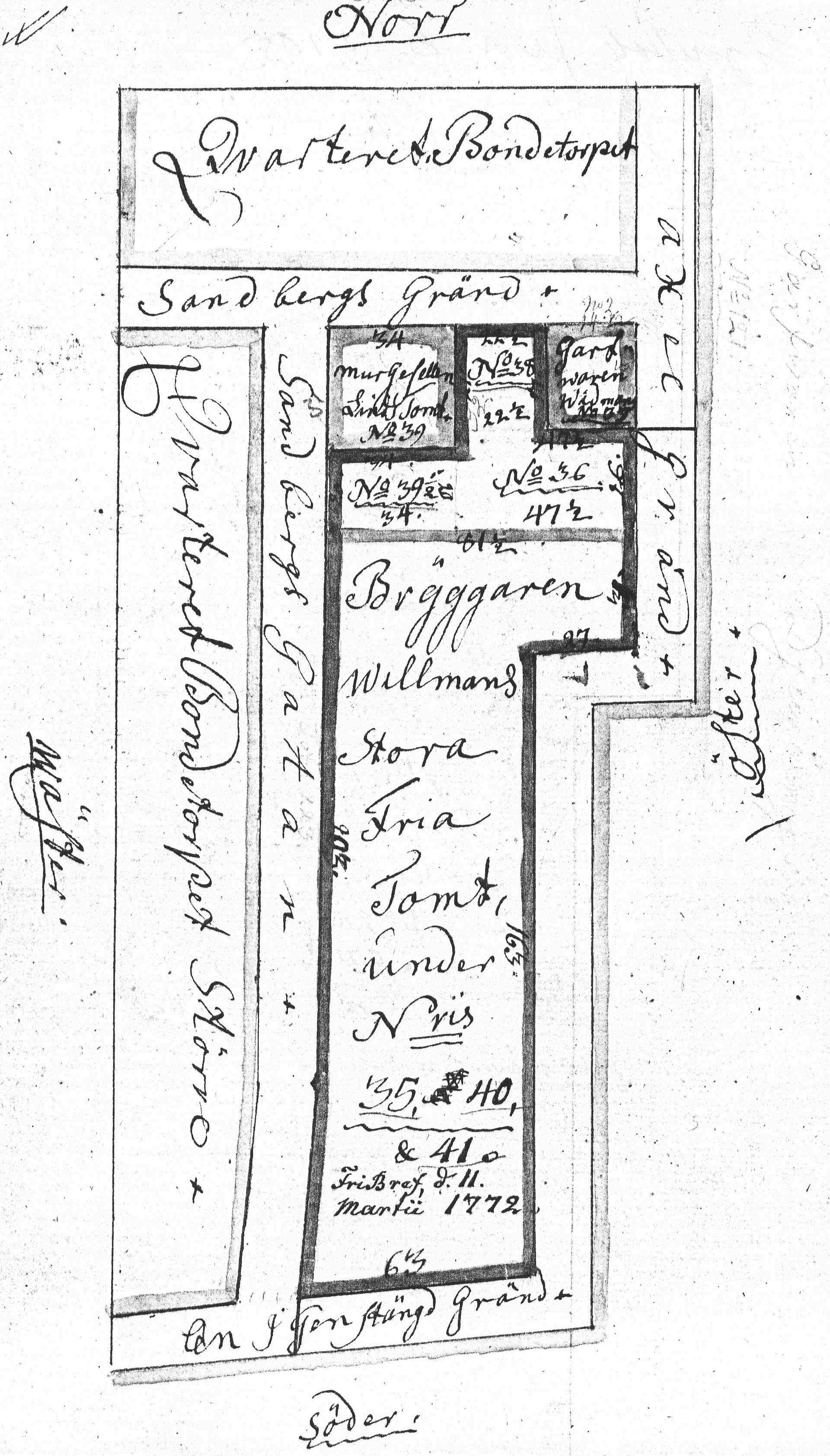 Tomtkarta över "Bryggaren Willmans fria tomt"